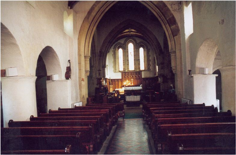 cc-by-3.0